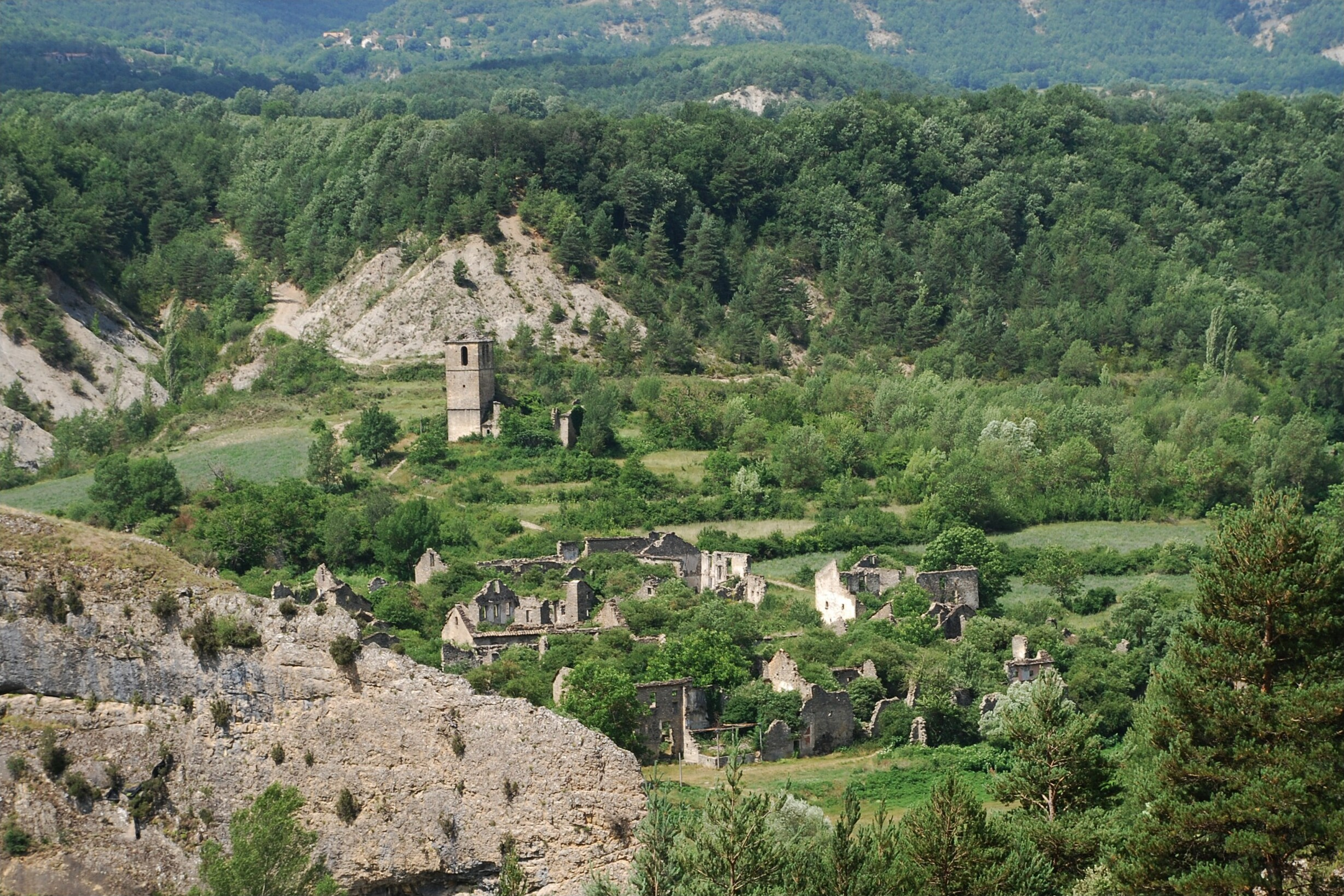 Jánovas, pueblo abandonado del municipio de Fiscal (Huesca, España)